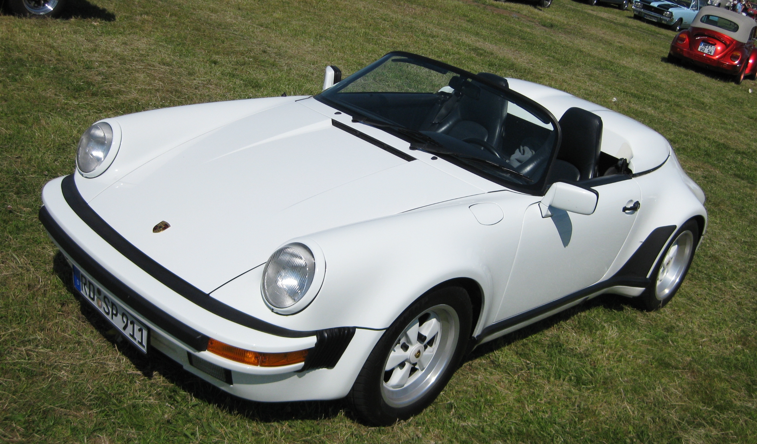 Porsche 911 Speedster G-Serie